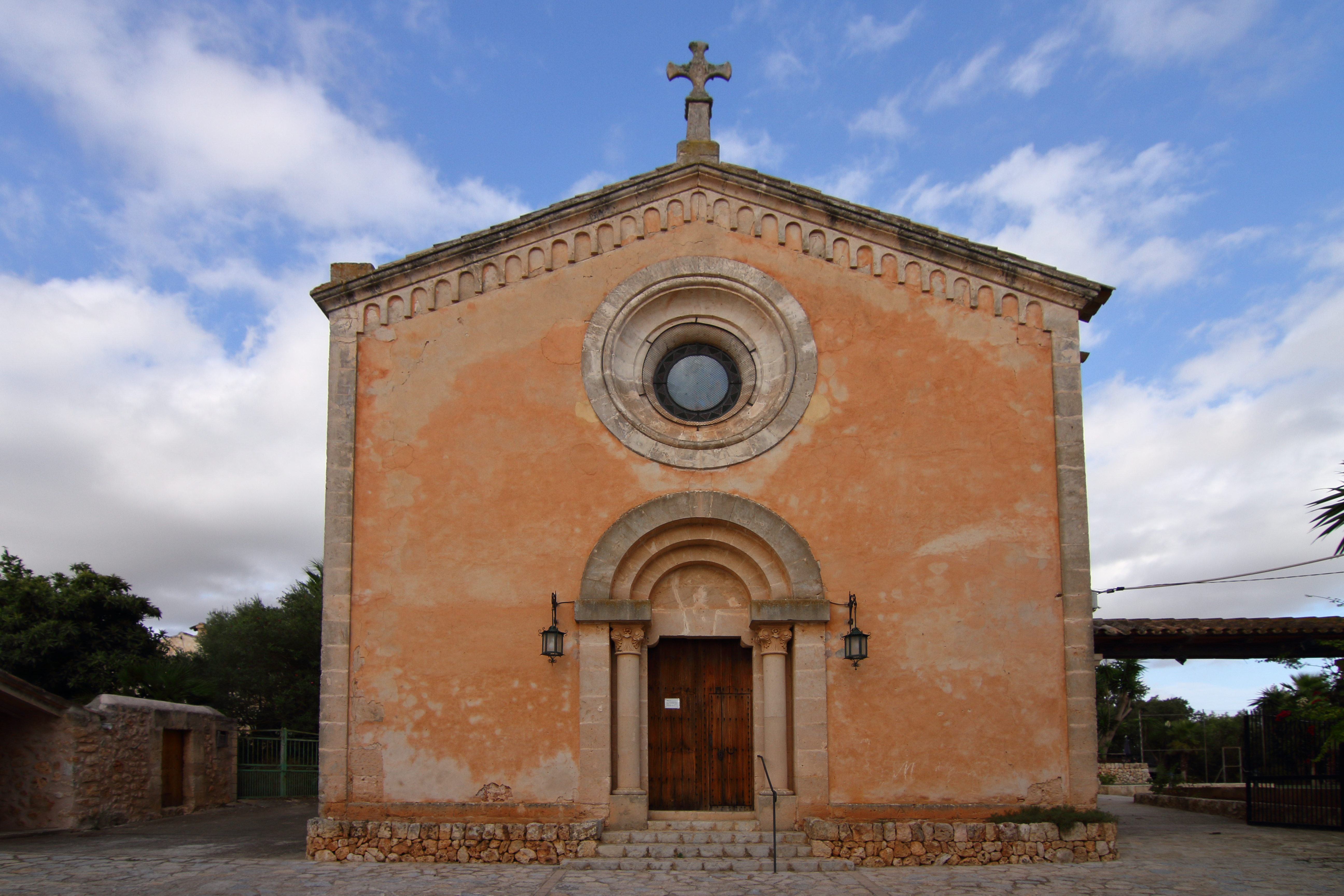 Ruberts, Iglesia parroquial, fachada principal